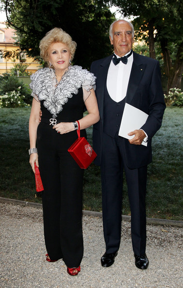 Umberto e Marinella Di Capua